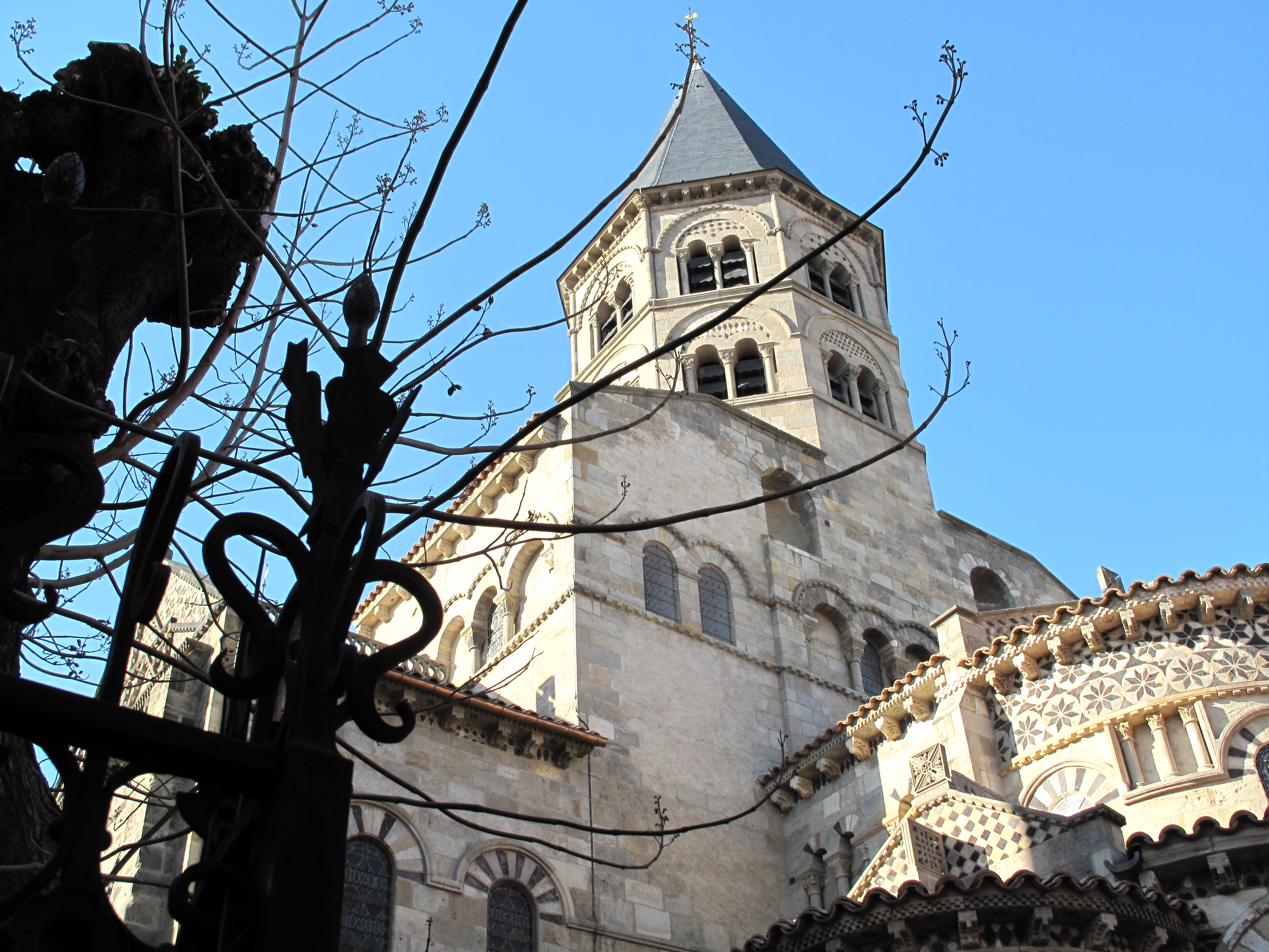 Eglise Notre-Dame du Port - Ville de Clermont-Ferrand .